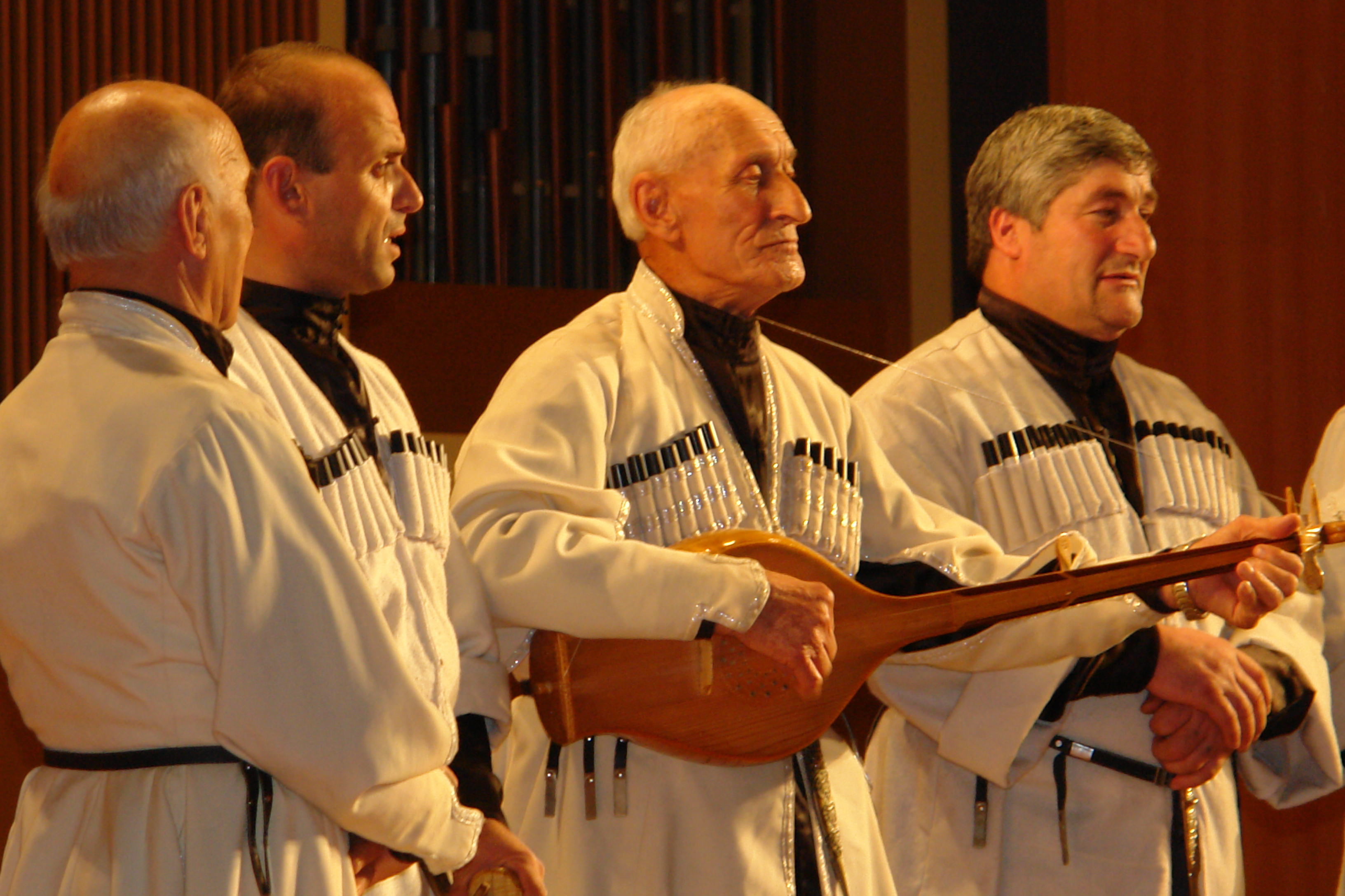 შემოქმედებითი საღამო